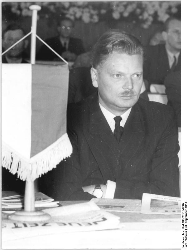 Zentralbild-TBD-Wlocka 2462 Zi-Ho. 10 Motive 23.9.1954 7. Parteitag der CDU in Weimar - 21. bis 25.9.1954 Am Mittwoch, den 22.9.1954, wurde in der Weimarhalle in Weimar, der 7. Parteitag der CDU unter Teilnahme zahlreicher Delegationen aus den volksdemokratischen Ländern und dem kapitalistischen Ausland eröffnet. UBz: Boleslav Piasecki, Vorsitzender der PAX-Bewegung Polens.